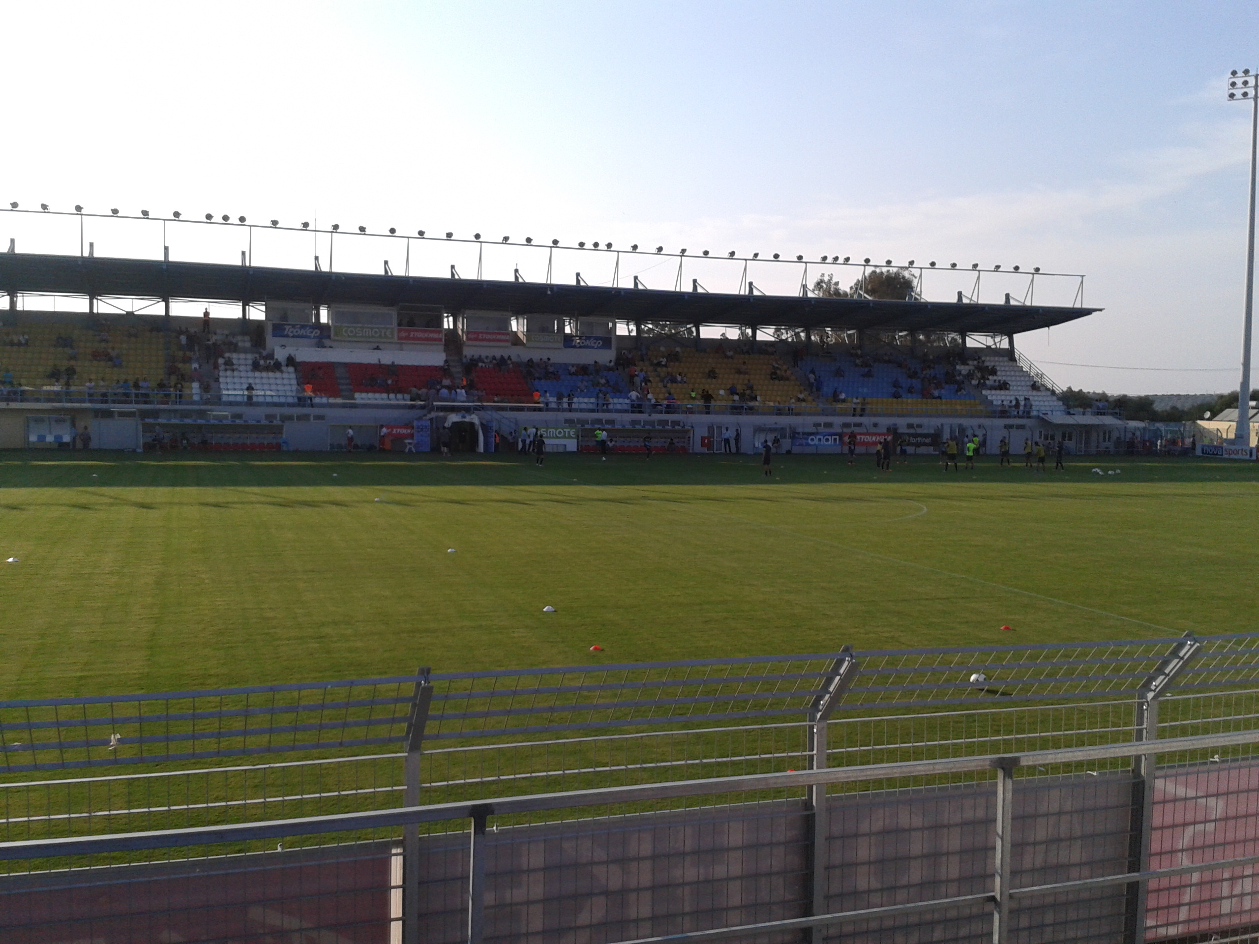 Perivolia Stadium. - Crete Island, Chania